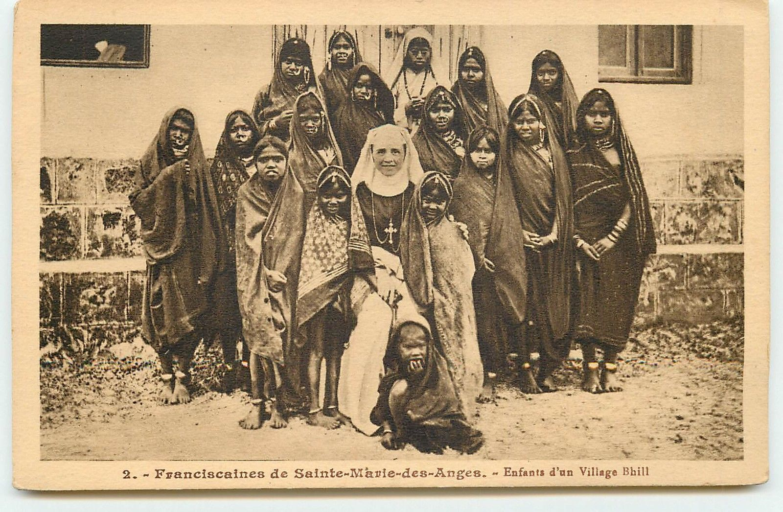 Franciscaine de Sainte-Marie-des-Anges avec des fillettes d'ethnie Bhill aux Indes. Années 1930.